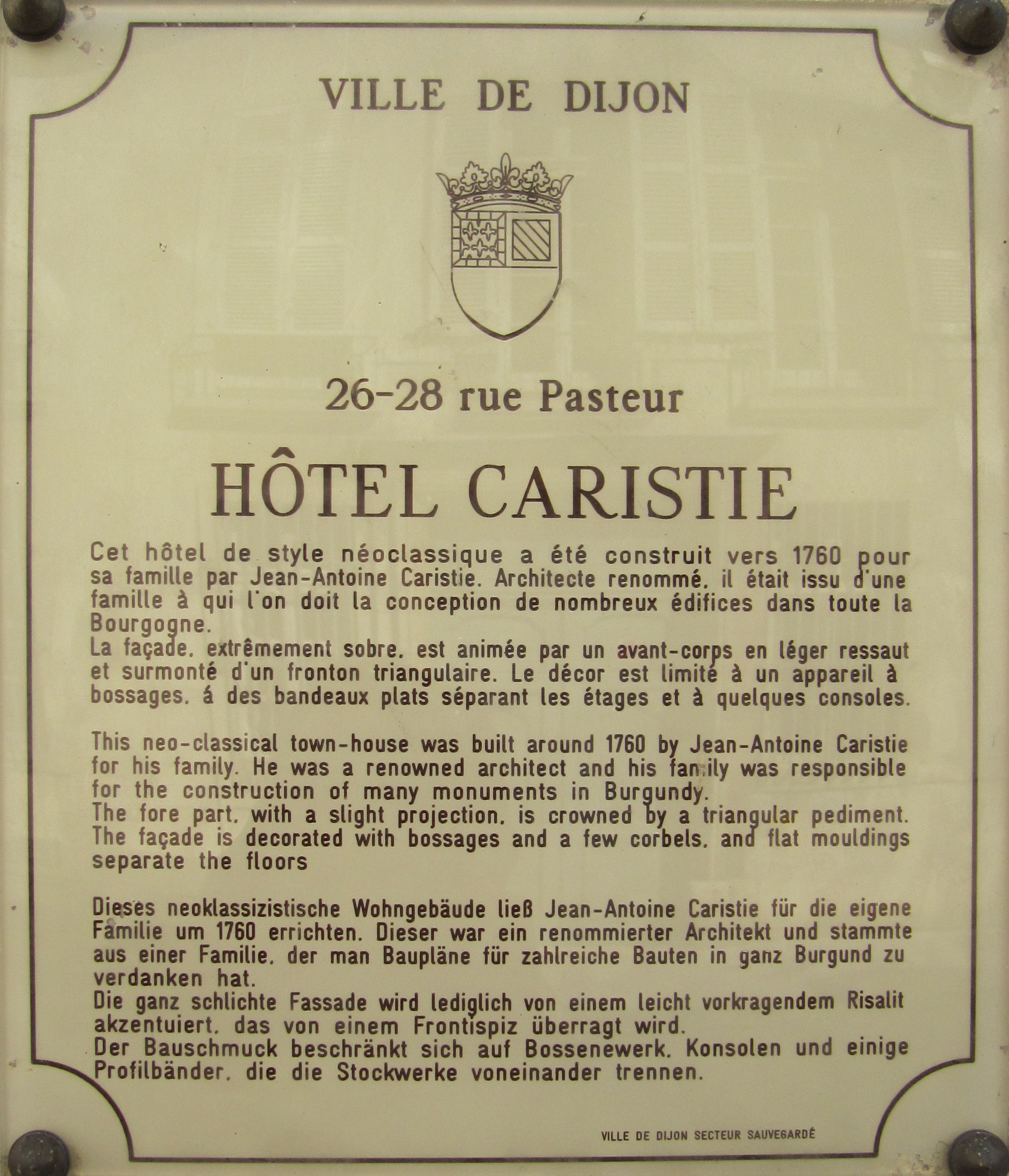 Plaque d'information trilingue (français, anglais, allemand) de l'hôtel Caristie, à Dijon